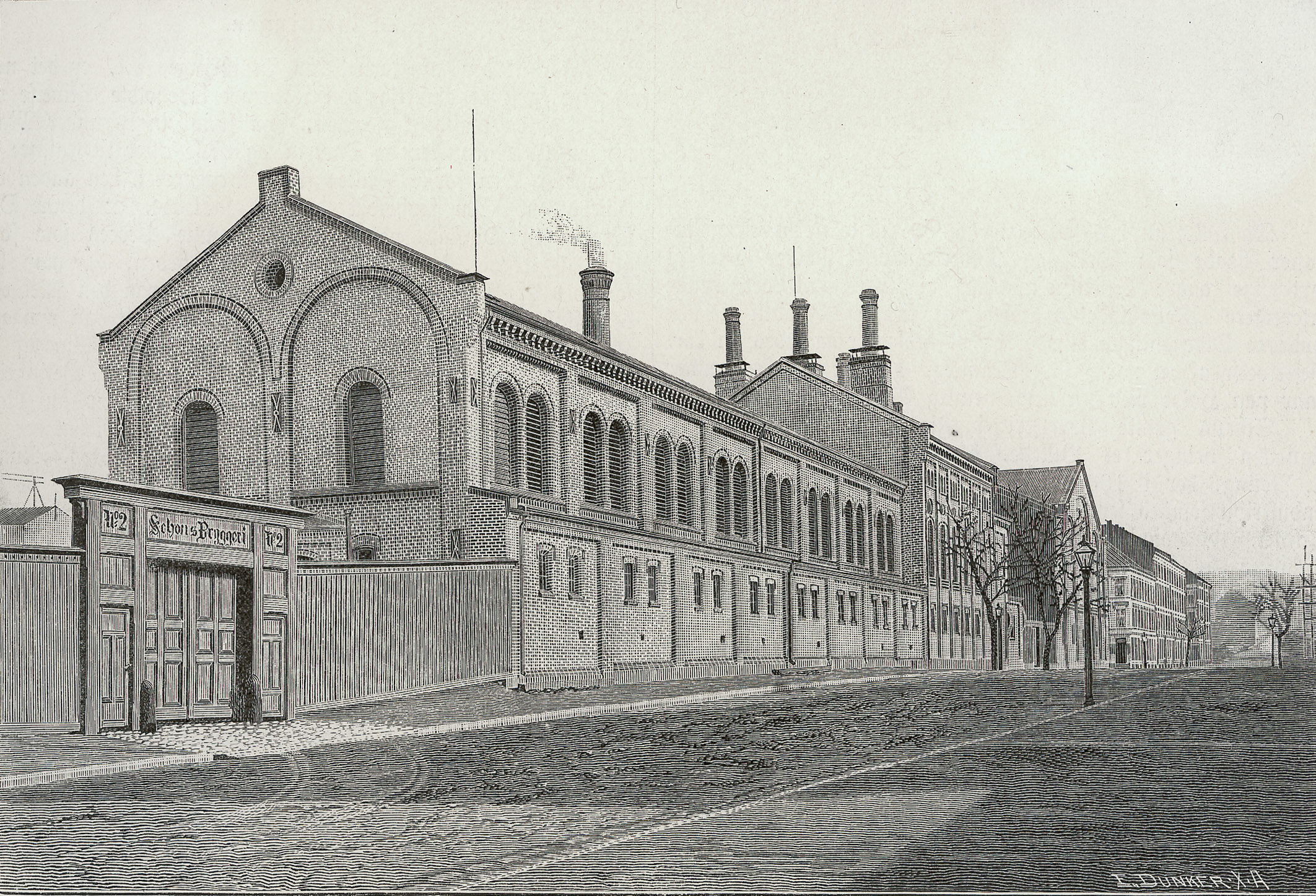 Schous Bryggeri i Throndhjemsveien - Xylografi av E. Dunker.